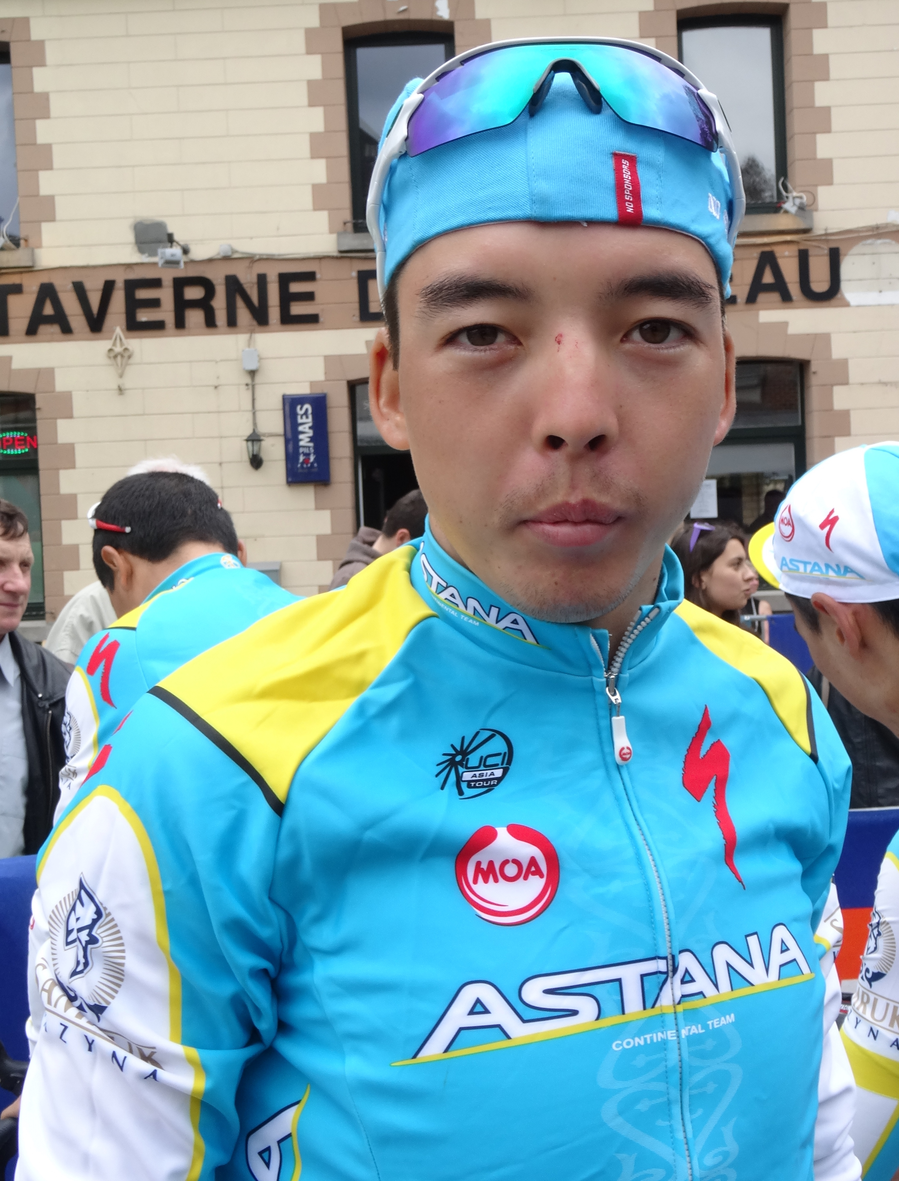 Triptyque des Monts et Châteaux 2014, étape 3, 6 avril 2014, départ de Belœil. Depicted person: Bakhtiyar Kozhatayev Depicted team: Astana Continental The creation of these files was made possible thanks to the organizers of the Triptyque des Monts et Châteaux 2014 English | français | +/−